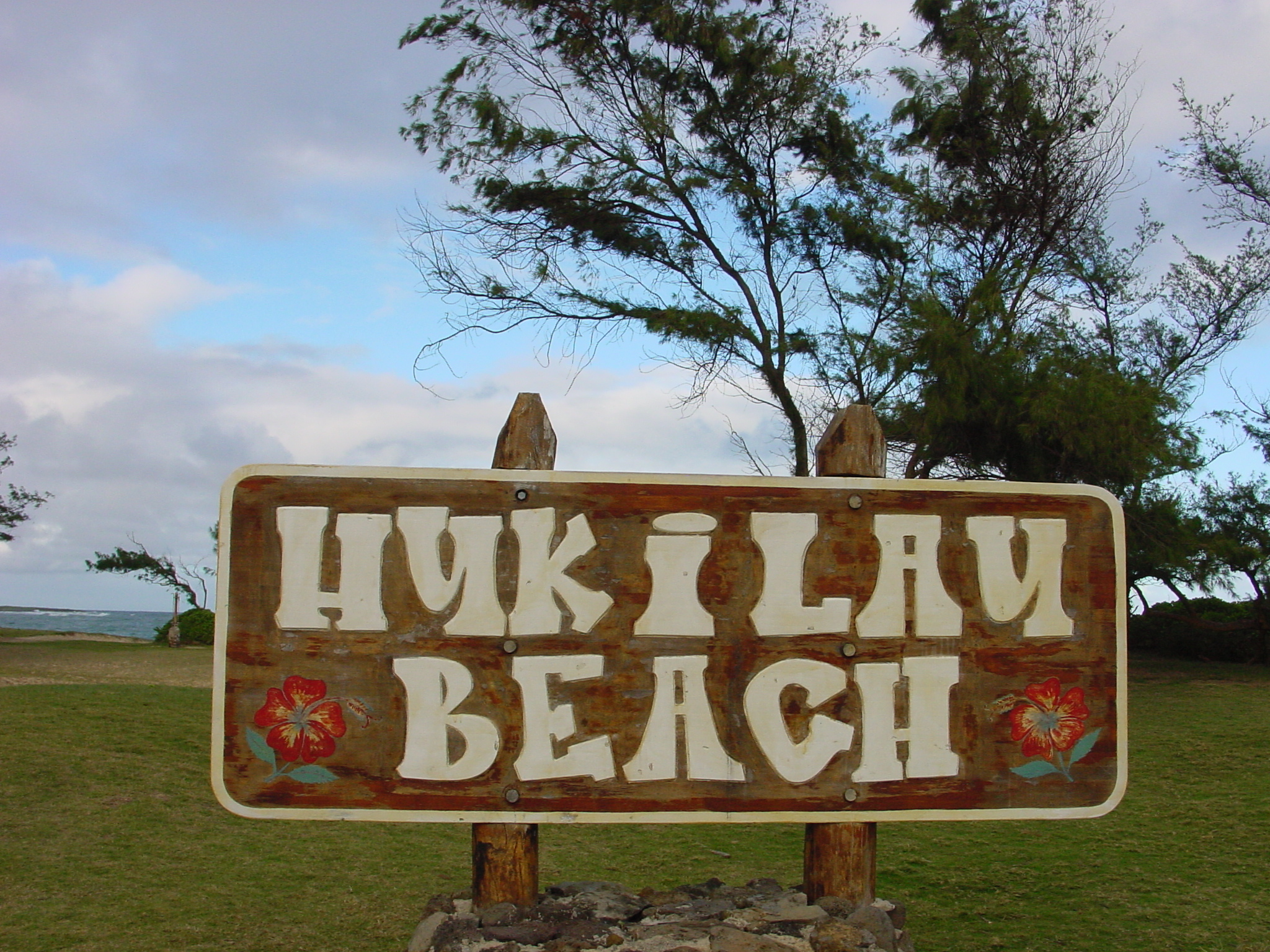 Hukilau Beach at Lā'ie, Hawai'i